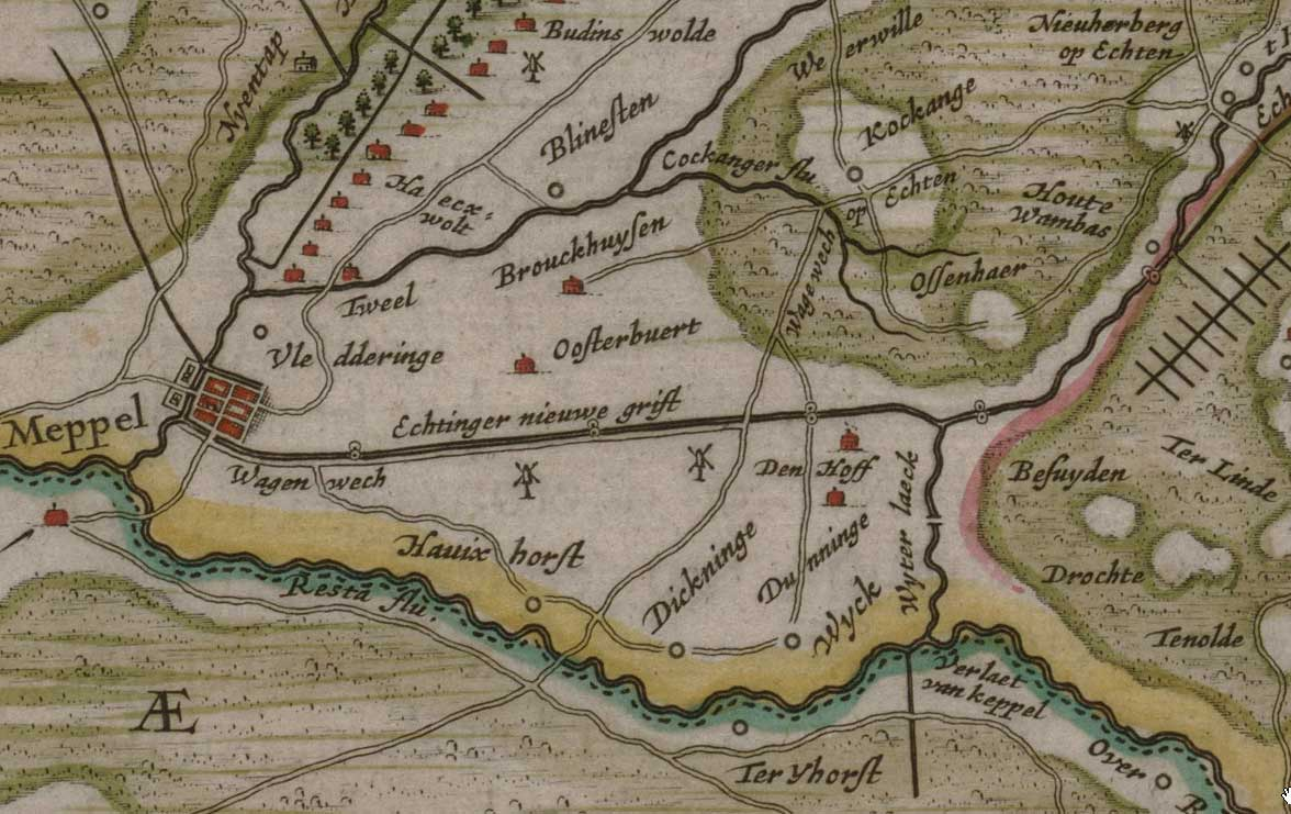 Detail van een oude kaart van Drenthe uit 1634